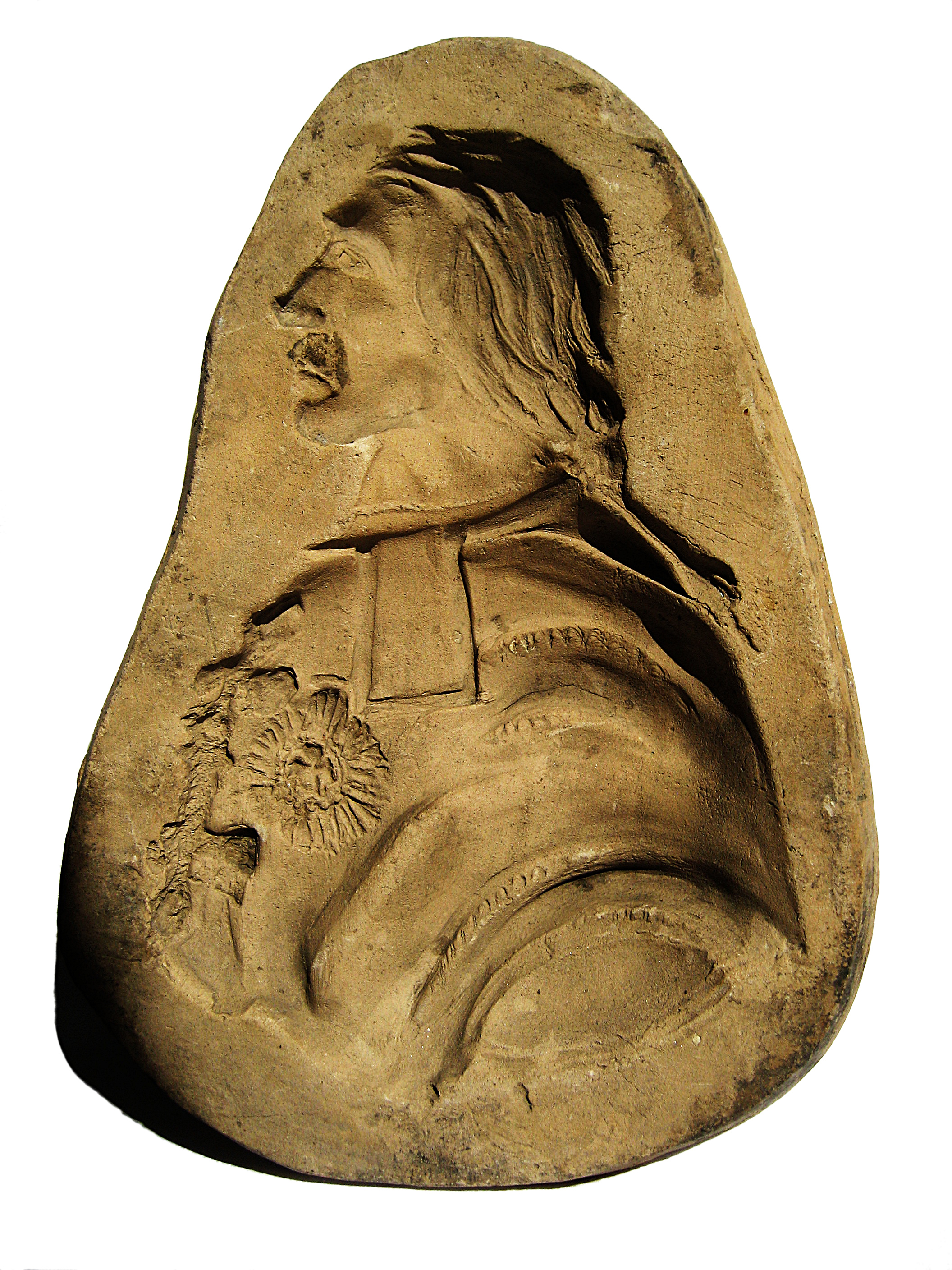 Model mit Kardinal Firmian aus St. Georgen